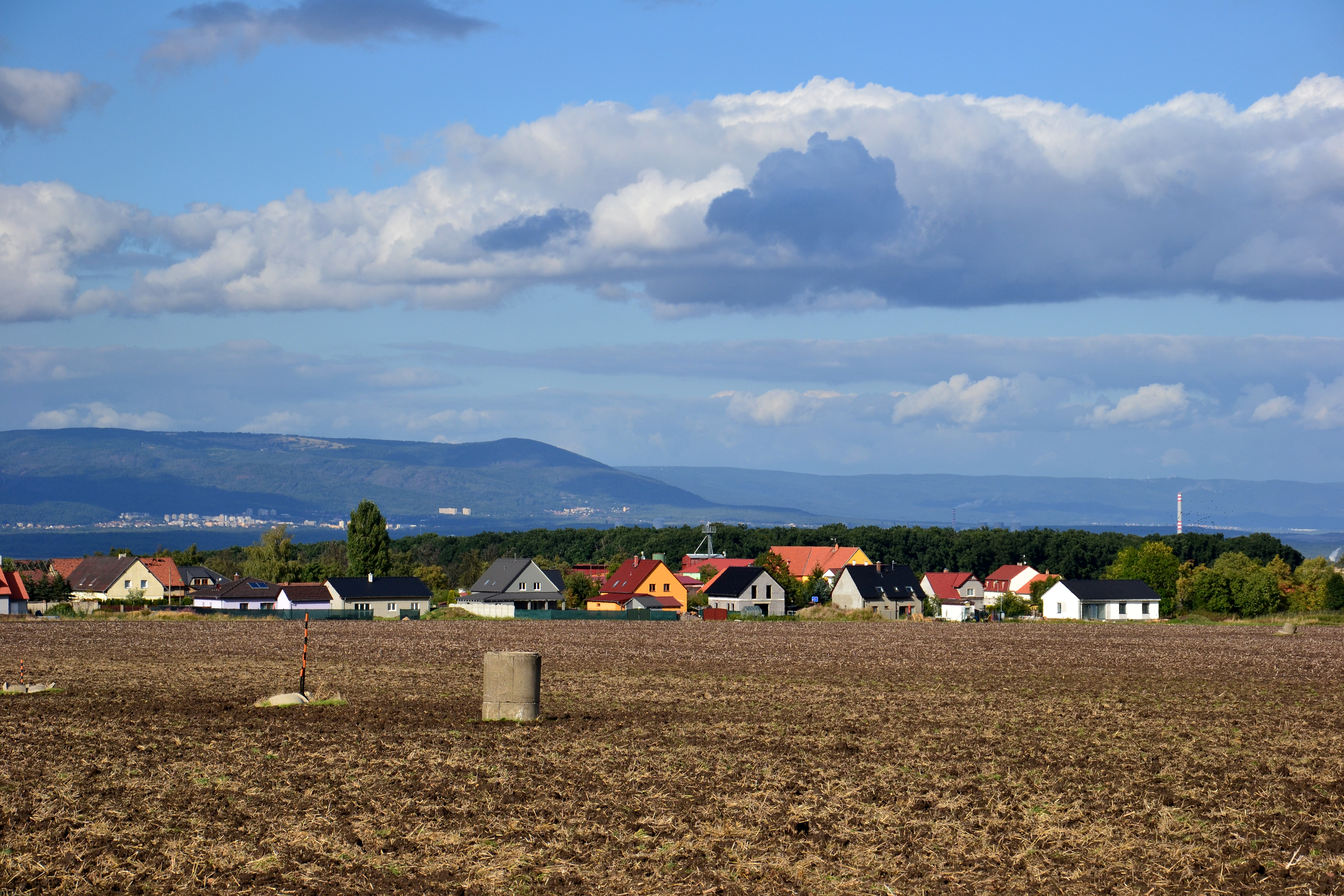 Pohled z jihozápadu